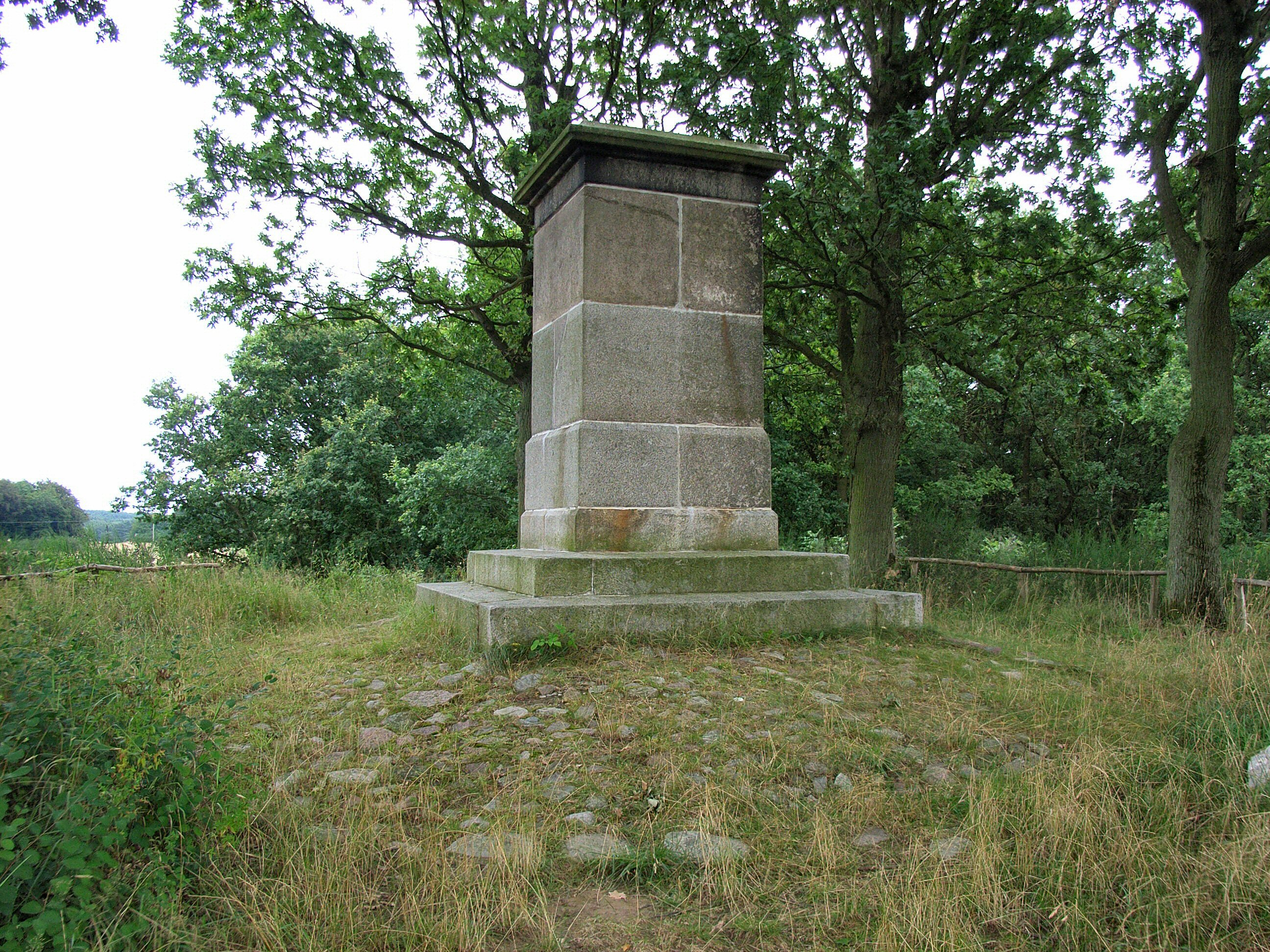 Postament der Preußensäule von 1855 bei Groß Stresow auf der Insel Rügen - im Oktober 2004 wiedererrichtet